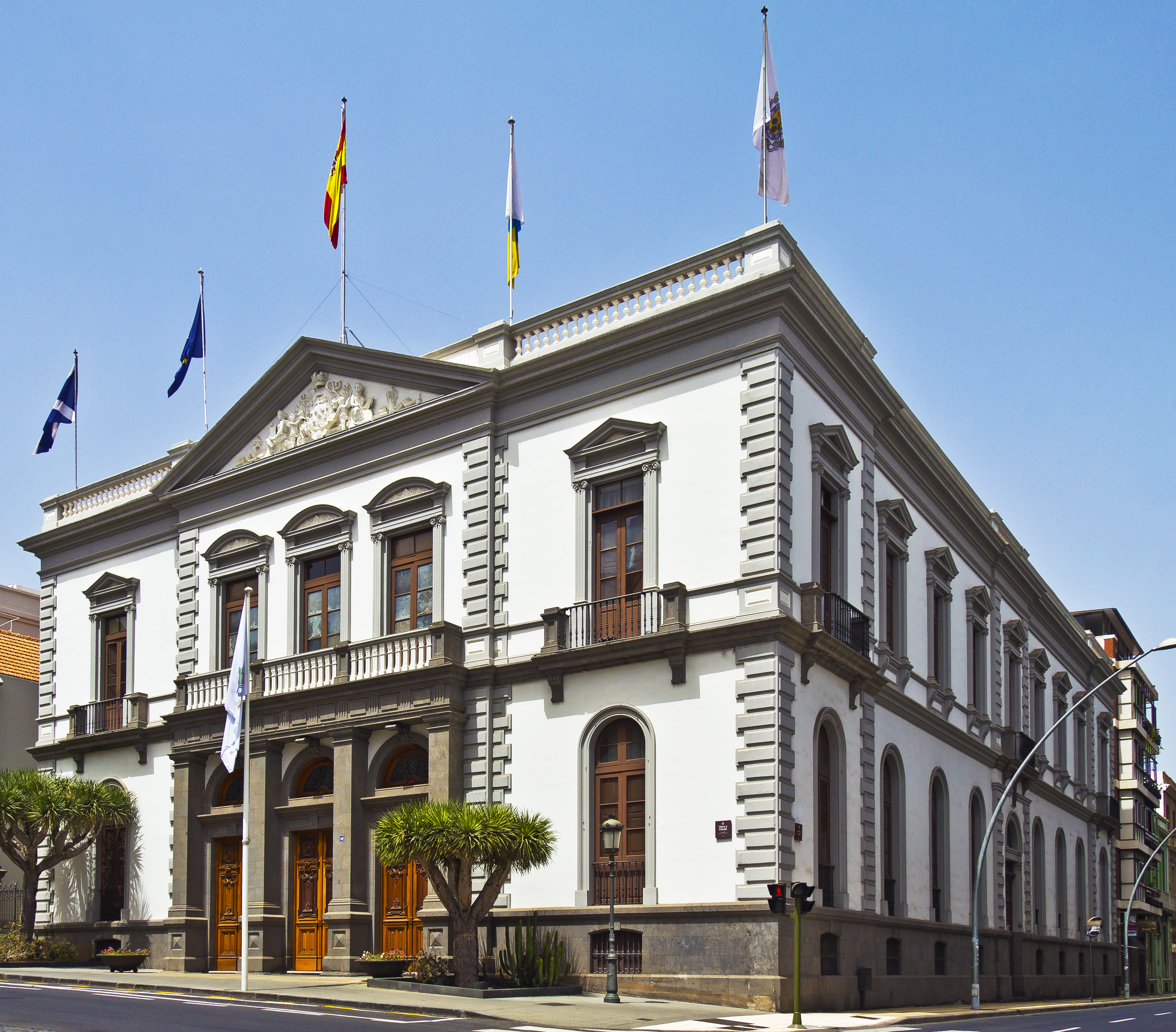 Das Rathaus der Stadt Santa Cruz de Tenerife wurde von dem Architekten Antonio Pintor y Ocete entworfen. Es wurde im Jahr 1916 fertiggestellt.